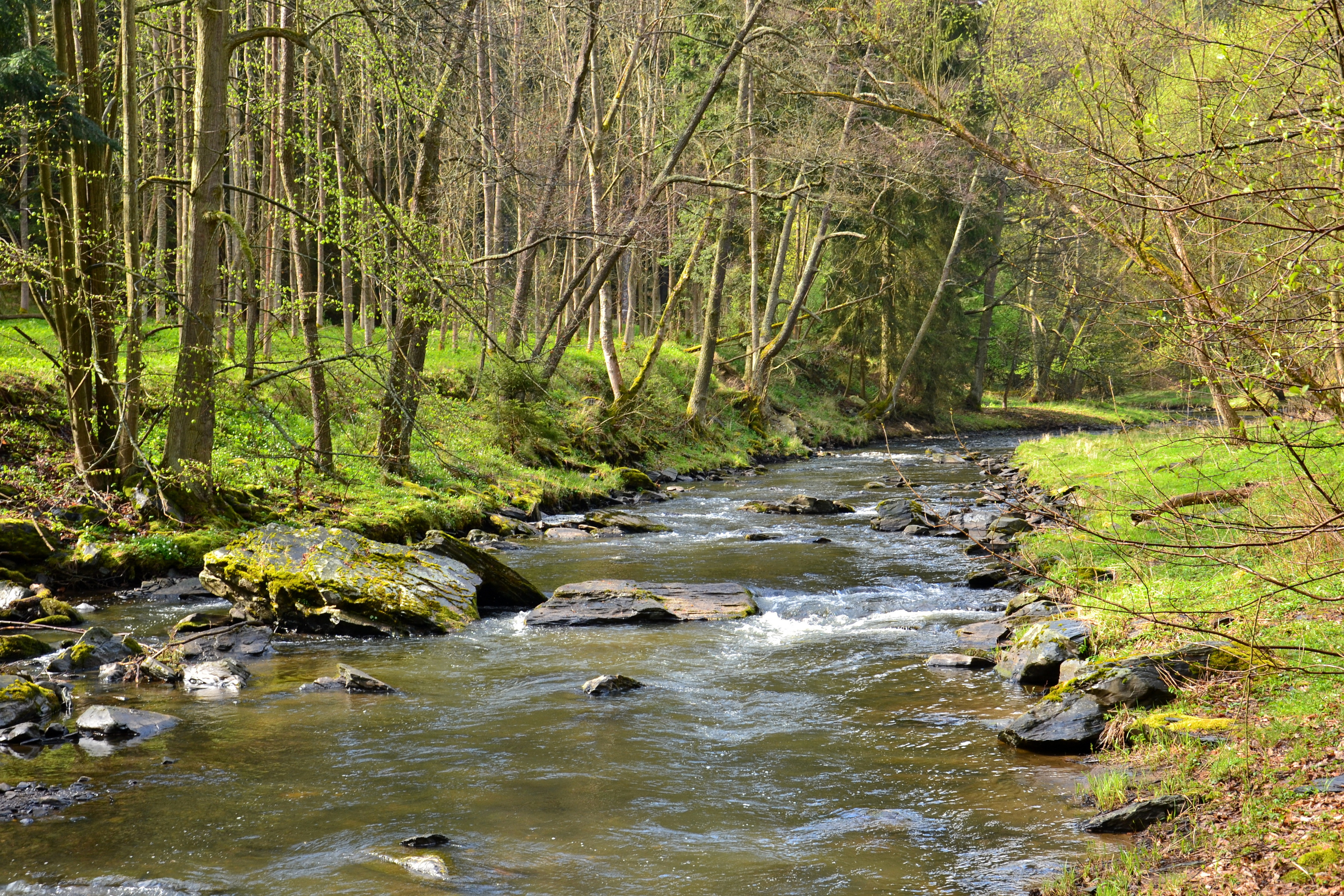 PR Střela - údolí Střely mezi Horovým mlýnem bývalým železným hamrem